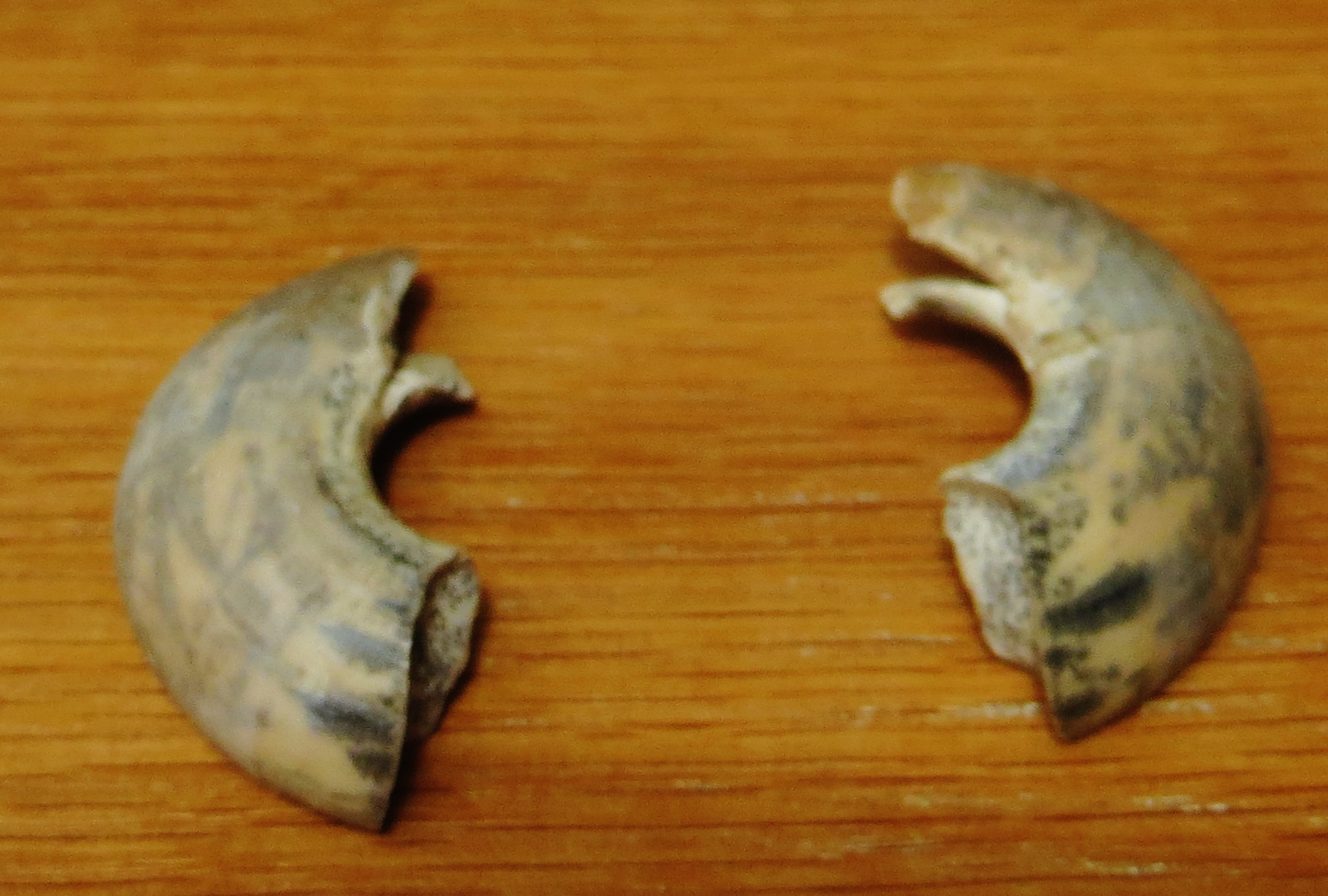 Plesiotypotherium fossil